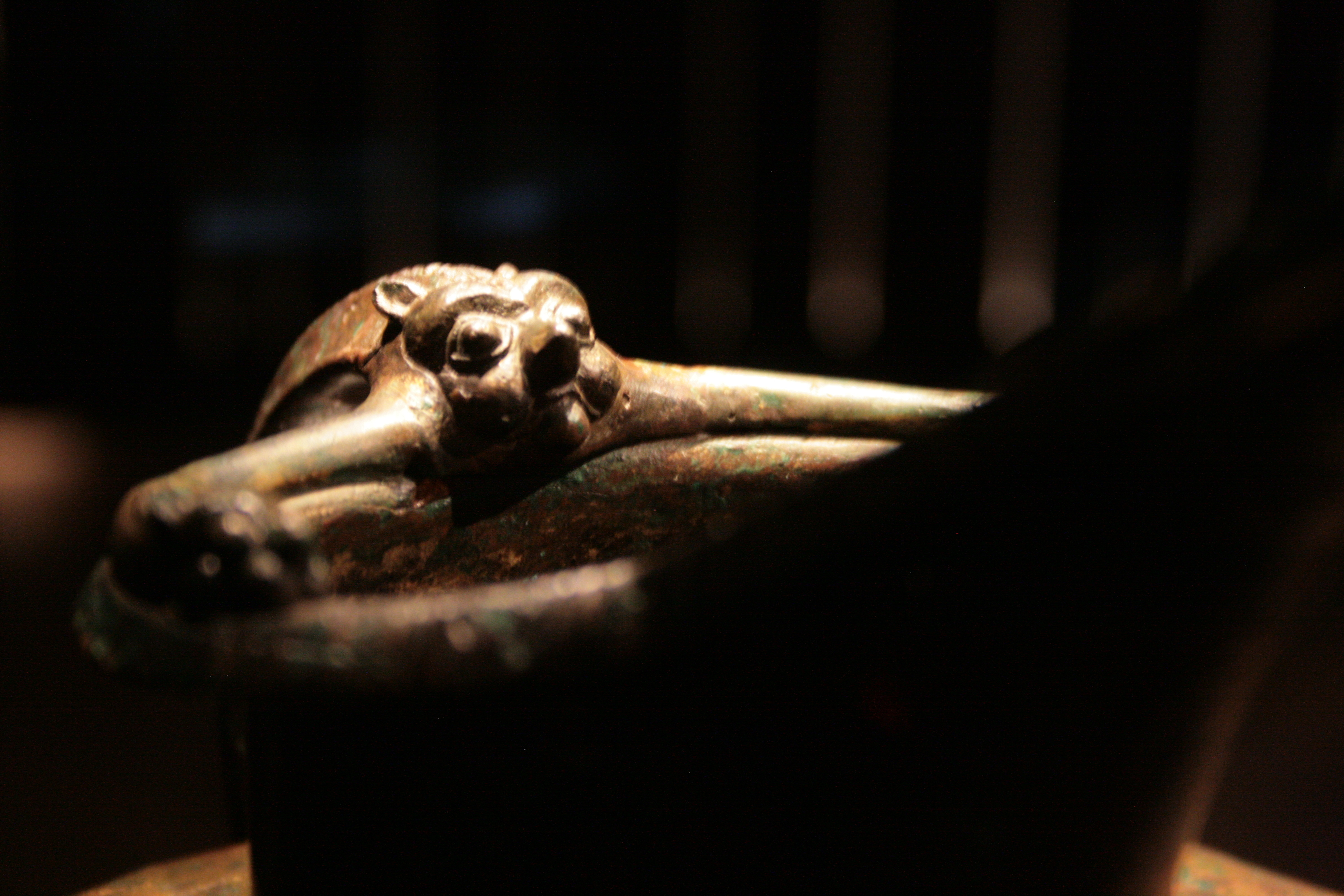 Bronzene Schnabelkanne aus dem "Fürstengrab". Asperg, um 430 von Christus.